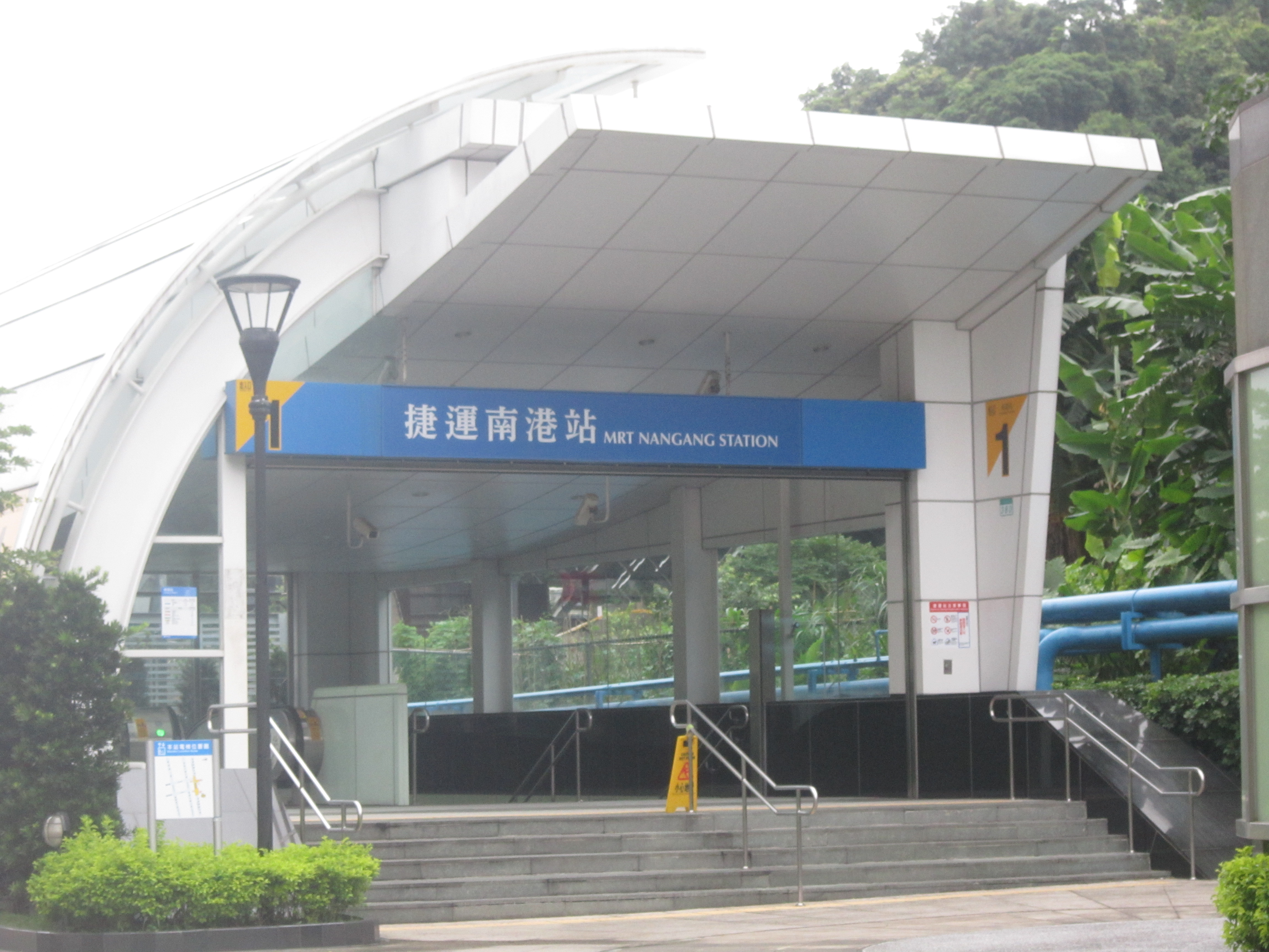 台北捷運南港站1號出口。